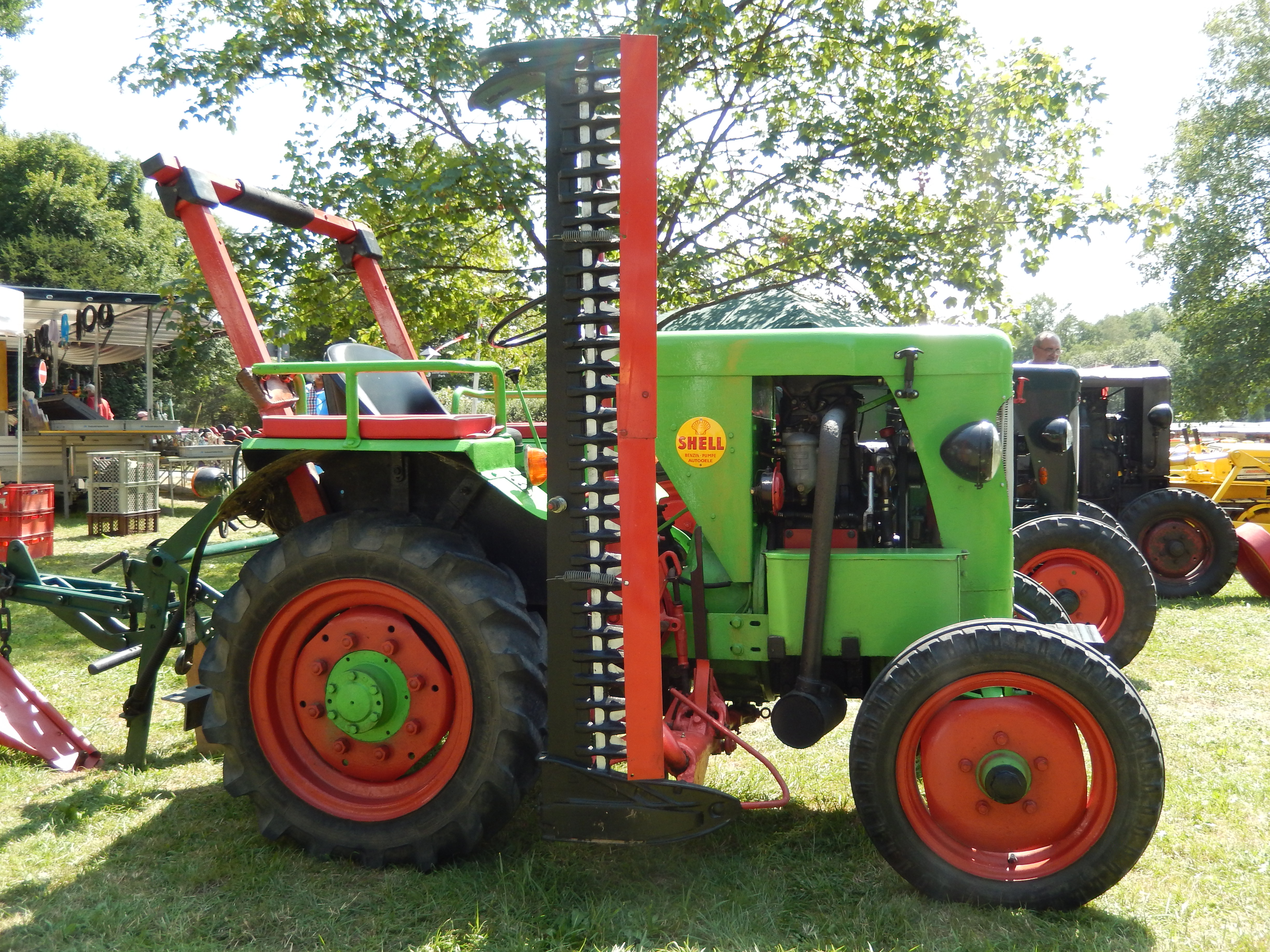 Ensinger AS15 Baujahr 1949 mit MWM 1 Zyl.Motor KDW 215E